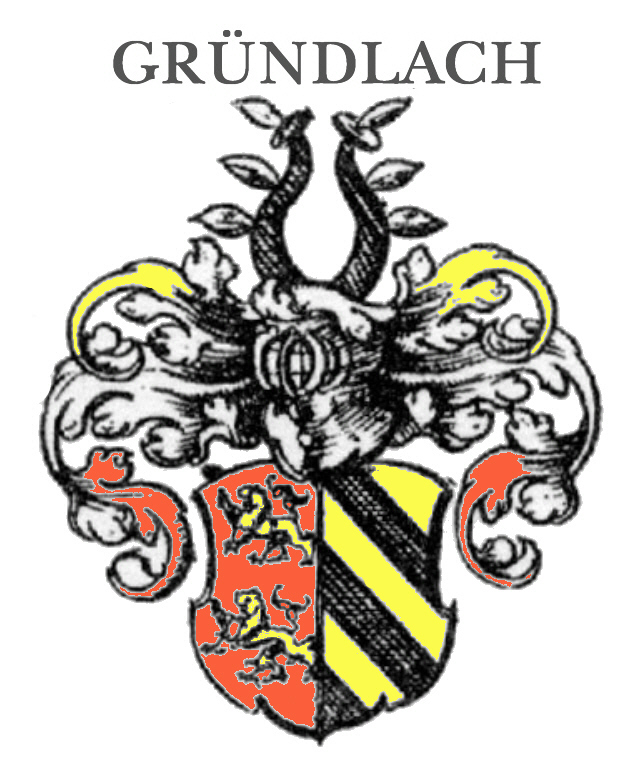 Wappen der Fränkischen Adelsfamilie der Herren von Gründlach - abgeleitet vom Wappen der Fränkischen Adelsfamilie Berg, von denen die Gründlach abstammen.